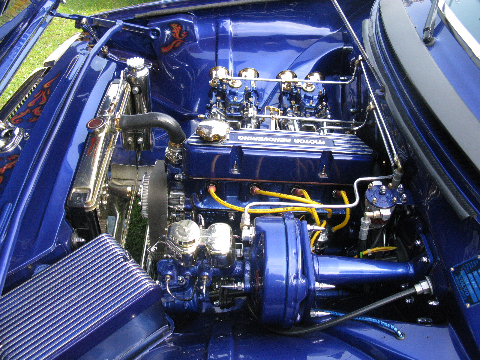 Volvo 142 Custom